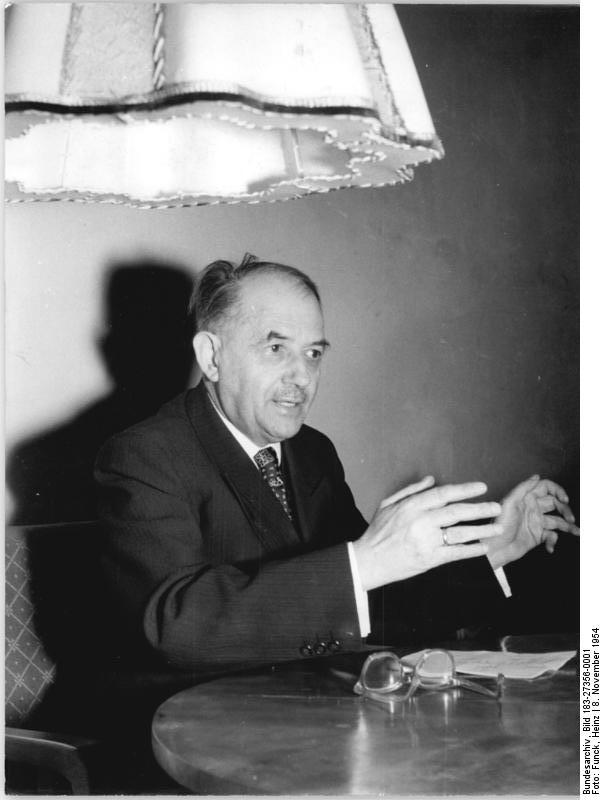 Zentralbild Funck 9.11.1954 Autorenlesung mit Professor Weismantel, Werner Warsinski und Kurt Bartel (Kuba) 1272.A.V.10.11.54 Im Auditorium Maximum der Humboldt-Universität fand am 8.11.1954 als Ausklang der "Deutschen Begegnung" der Geistesschaffenden in Berlin eine Autorenlesung mit den Schriftstellern Professor Leo Weismantel - Obersinn (Unterfranken), Werner Warsinski aus Lünen (Westfalen) und Nationalpreisträger Kurt Bartel (Kuba), Berlin statt. UBz: Professor Leo Weismantel bei seiner Vorlesung.